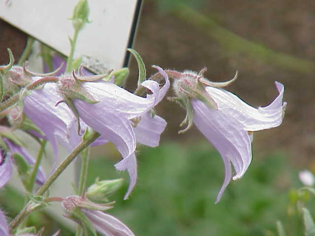 Species: Campanula sarmatica Family: Campanulaceae Image No. 1